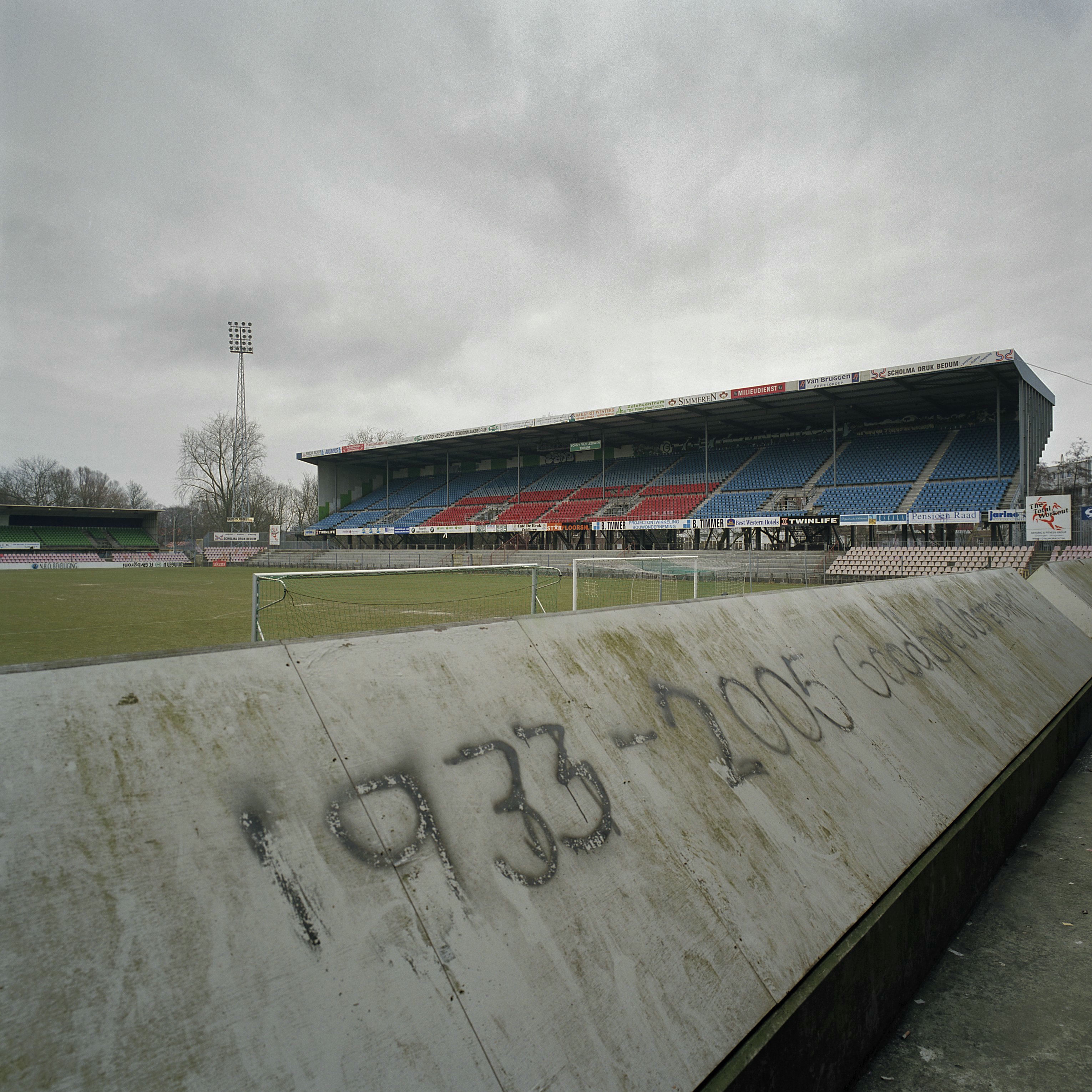 F.C. Groningen Stadion Oosterpark: Afscheidstekst (graffiti) door supporters van FC Groningen op de achterkant van de reclamewand '1933 - 2005 goodbye Oosterpark' (opmerking: Stadion gefotografeerd voordat het gesloopt gaat worden)